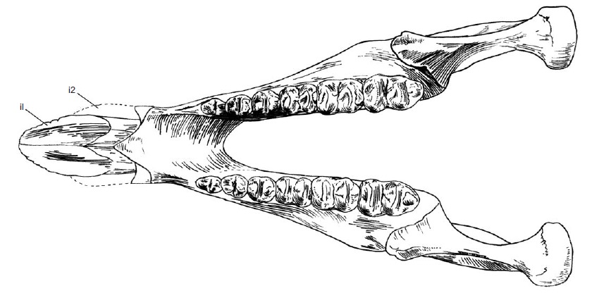 Holotype mandible (BMNH M. 82163a, b, c) of the proboscidean Arcanotherium savagei (Court, 1995), from the Idam Unit (early Oligocene) of Dor El Talha, Libya